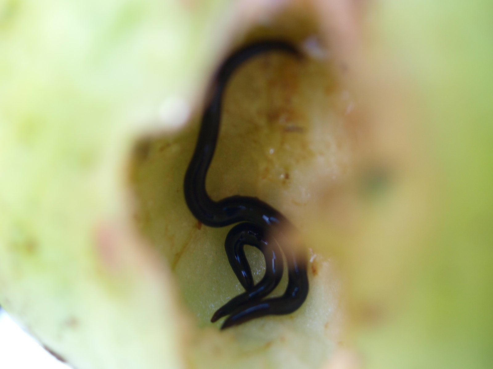 Deux plathelminthes invasif terrestres, probablement Parakontikia ventrolineata (Geoplanidae), dans une pomme, récoltés à Bohars, Finistère, France.